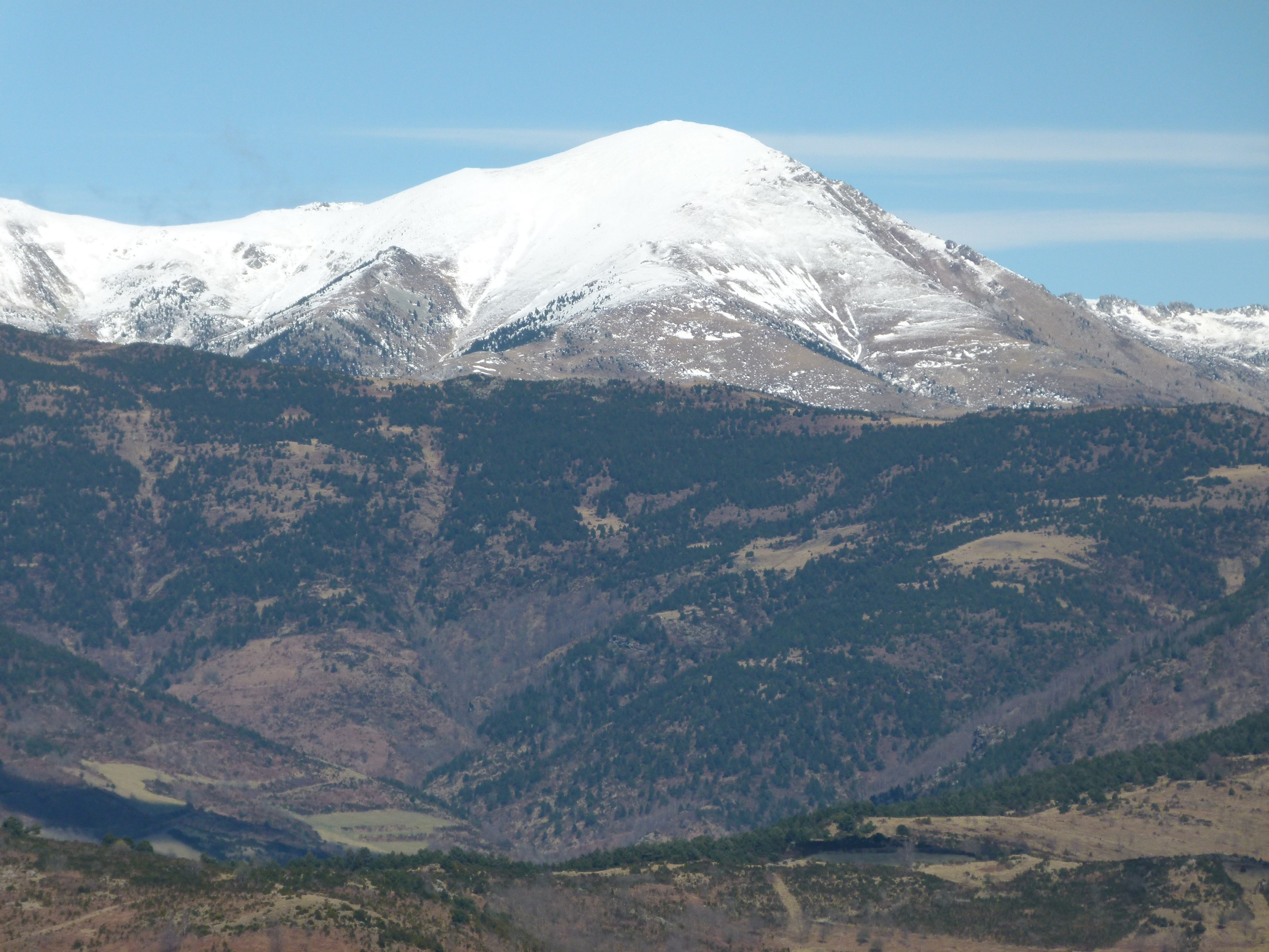 Pic de Costabona i coll del Pal (a l'esquerra) vistos des de St. Antoni de Camprodon